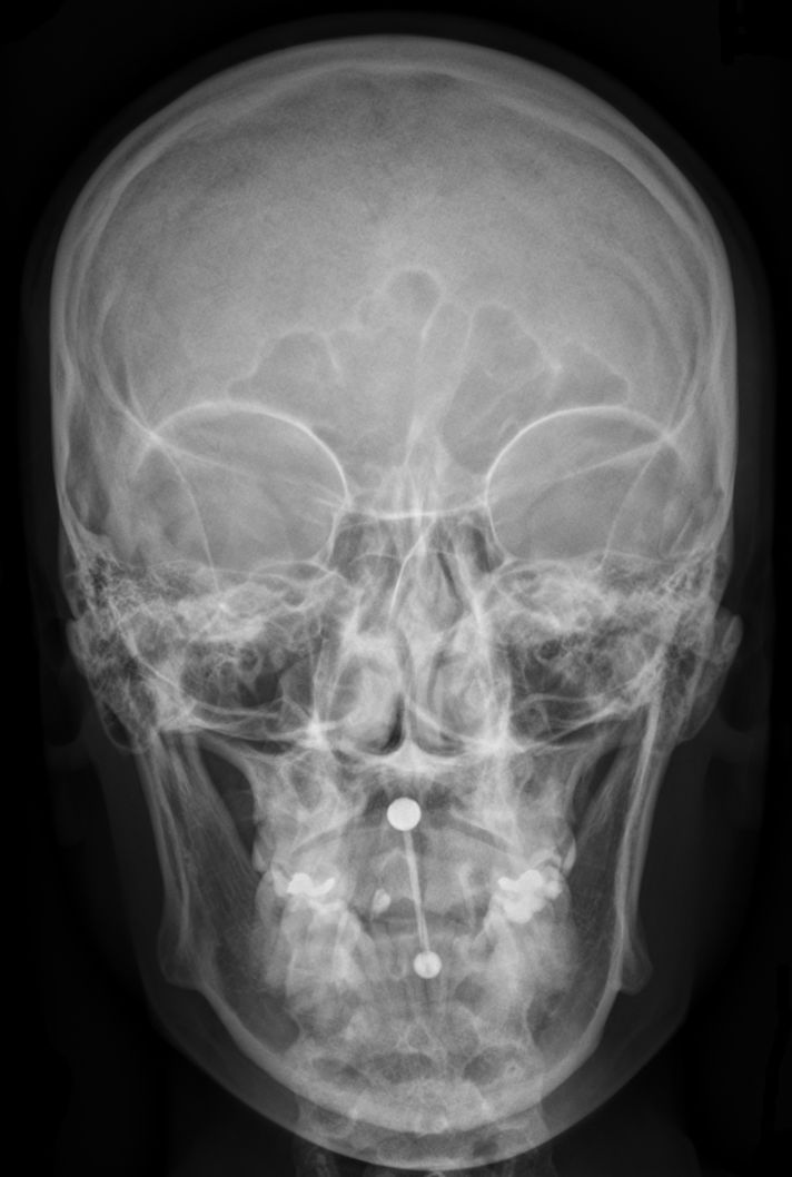 Zungenpiercing in der Röntgenaufnahme des Schädels ap.